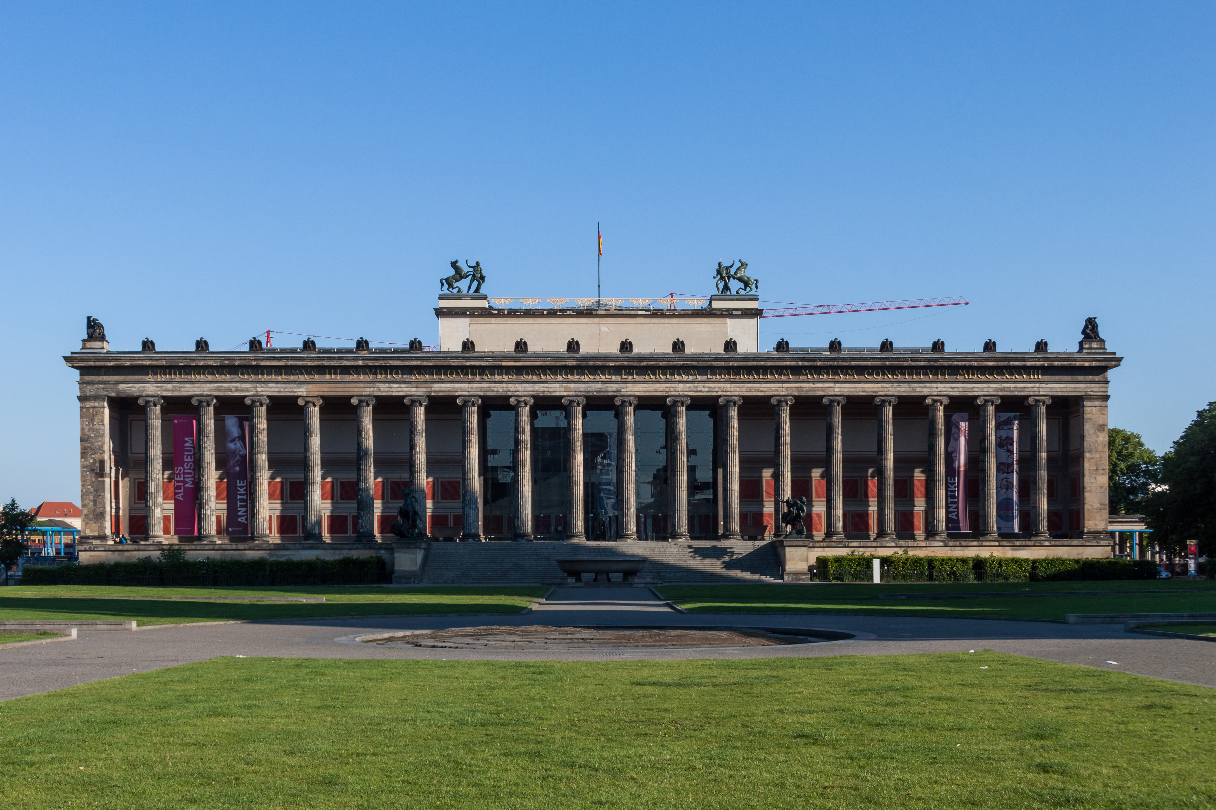 Frontansicht des Alten Museums in Berlin.